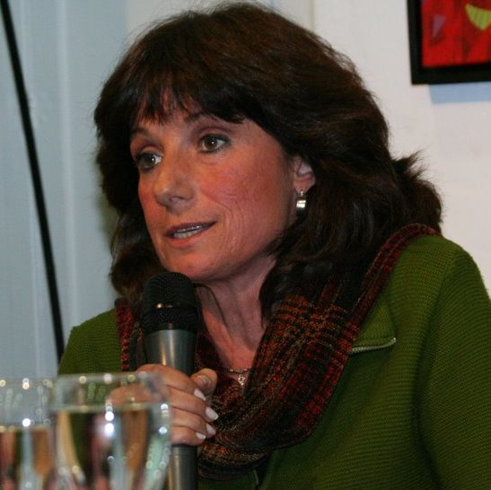 Vilma Ripoll (MST - Cap. Fed.) Fotografía | Marité Sganga/underpress.com.ar